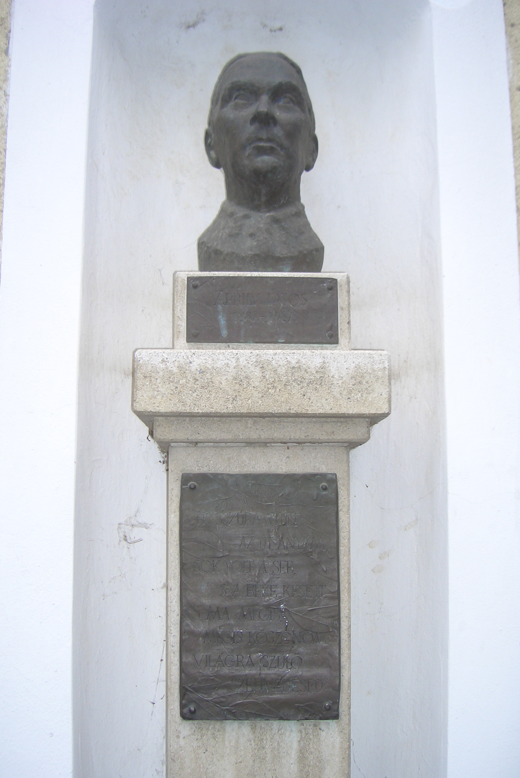 Áprily Lajos költő mellszobra a szentendrei Ferences Gimnázium falán, készítette a lánya, Jékely Márta, 1987-ben (Szentendre, Áprily Lajos tér)